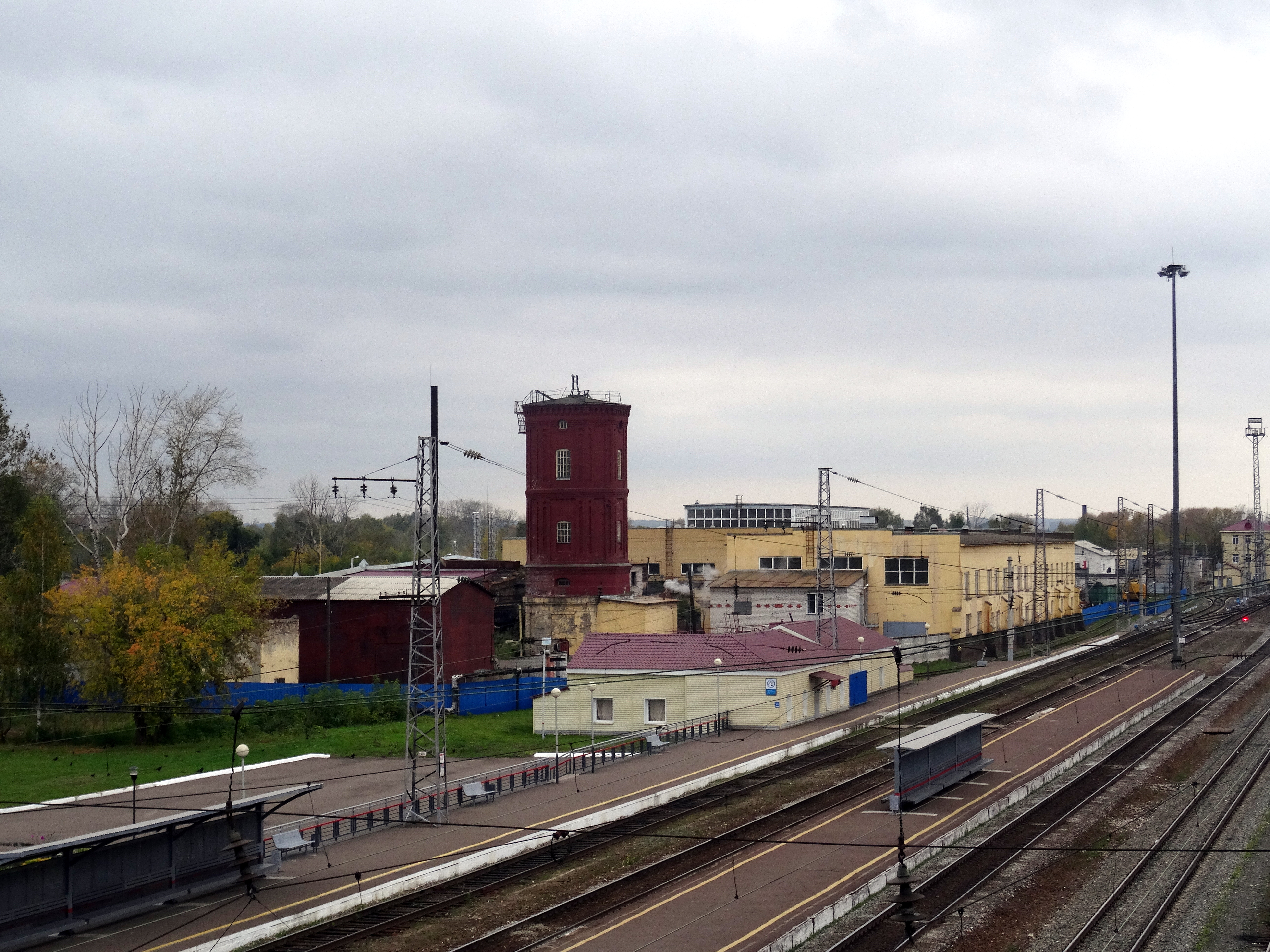 Водонапорная башня: Зуевка, Зуевский район, Кировская область